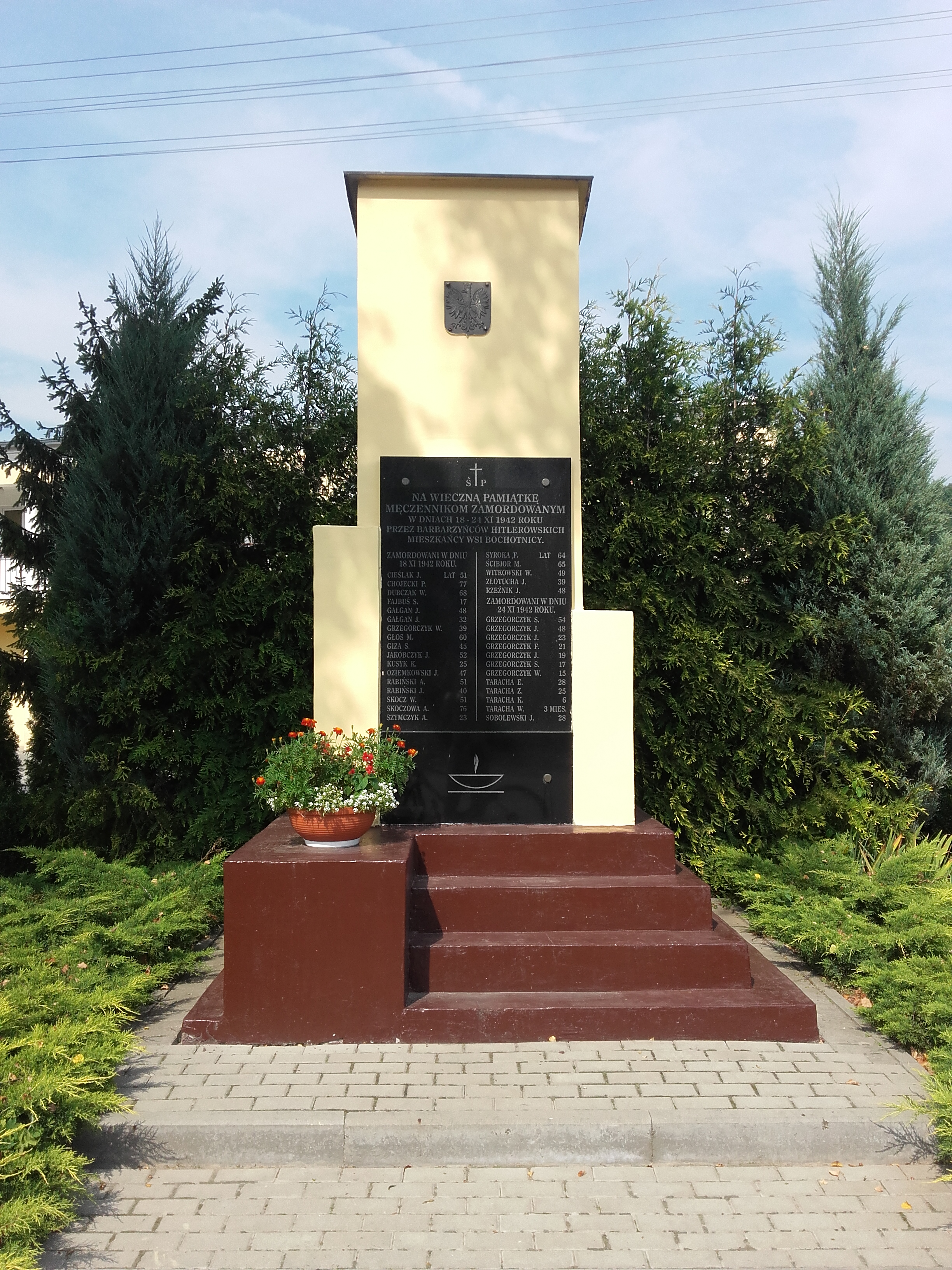 Pomnik ofiar „Krwawej Środy” z 18 oraz 24 listopada 1942 w Bochotnicy